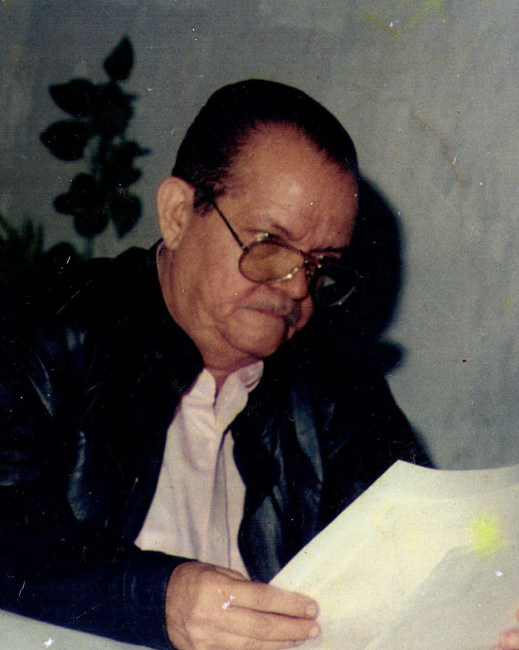 El médico yaracuyano Nicolás E. Capdevielle P.